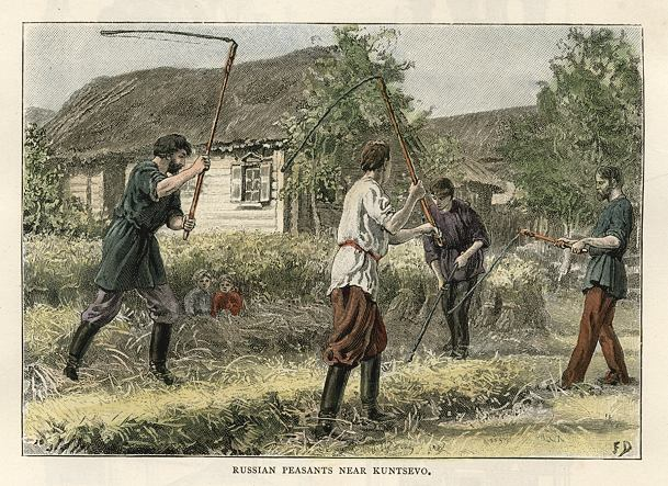 Молотьба хлеба крестьянами села Кунцево. 1889 г.